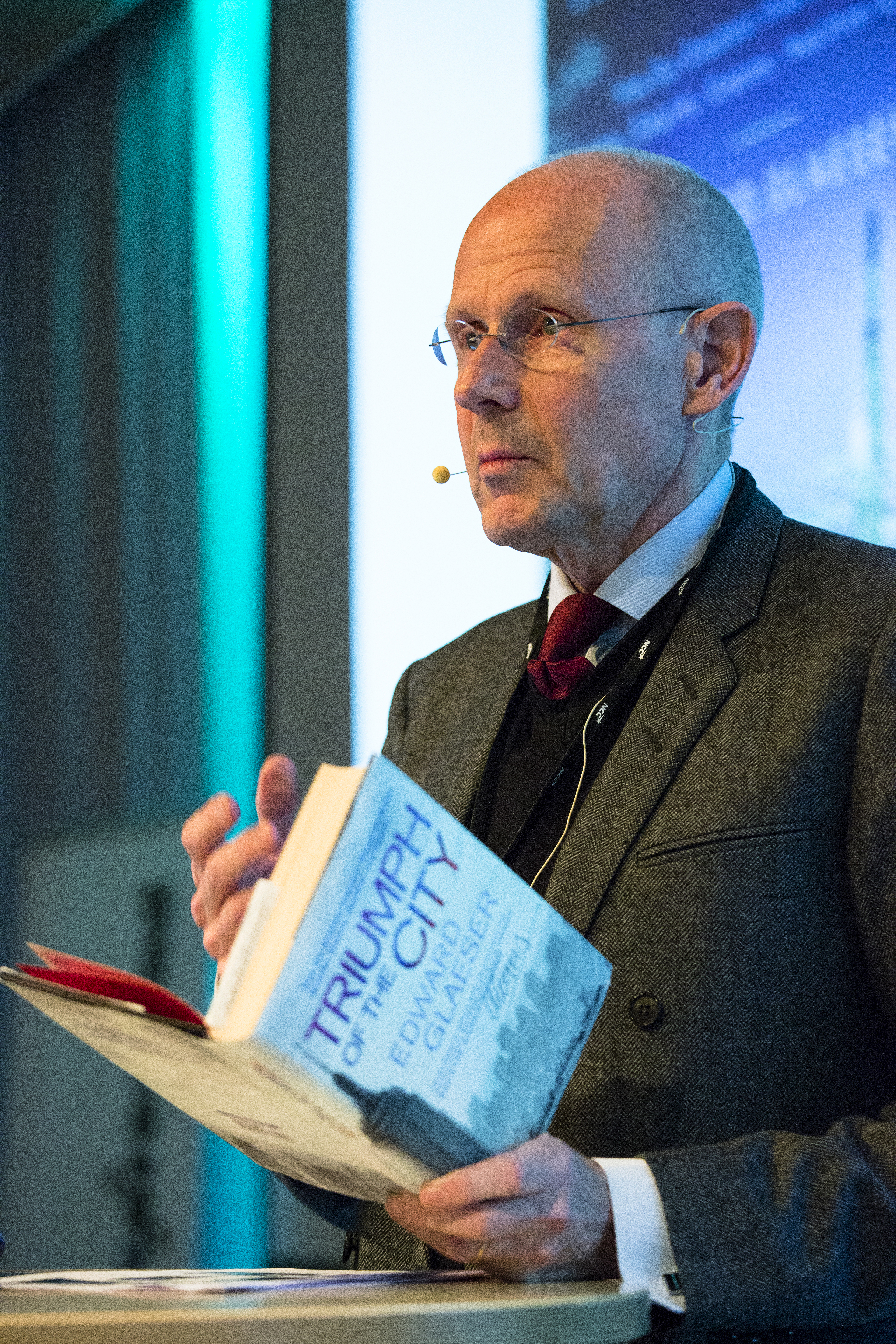 Christer Larsson, stadsbyggnadsdirektör Malmö stad fotograferad 31 januari 2013 när han talade vid fastighetskonferensen Real Estate Øresund i Malmö Börshus. Foto: News Øresund - Johan Wessman. © News Øresund. Bilden får fritt publiceras under förutsättning att källa anges (Foto: News Øresund + fotografnamn). The picture can be used freely under the prerequisite that the source is given (Photo: News Øresund + the name of the photografer. Originalfil tillhandahålles gratis, kontakta: News Øresund, Malmö, Sweden. News Øresund är en oberoende regional nyhetsbyrå som ingår i projektet Øresund Media Platform som drivs av Øresundsinstituttet i partnerskap med Lunds universitet och Roskilde Universitet och med delfinansiering från EU (Interreg IV A Öresund) och 14 regionala, icke kommersiella, aktörer.